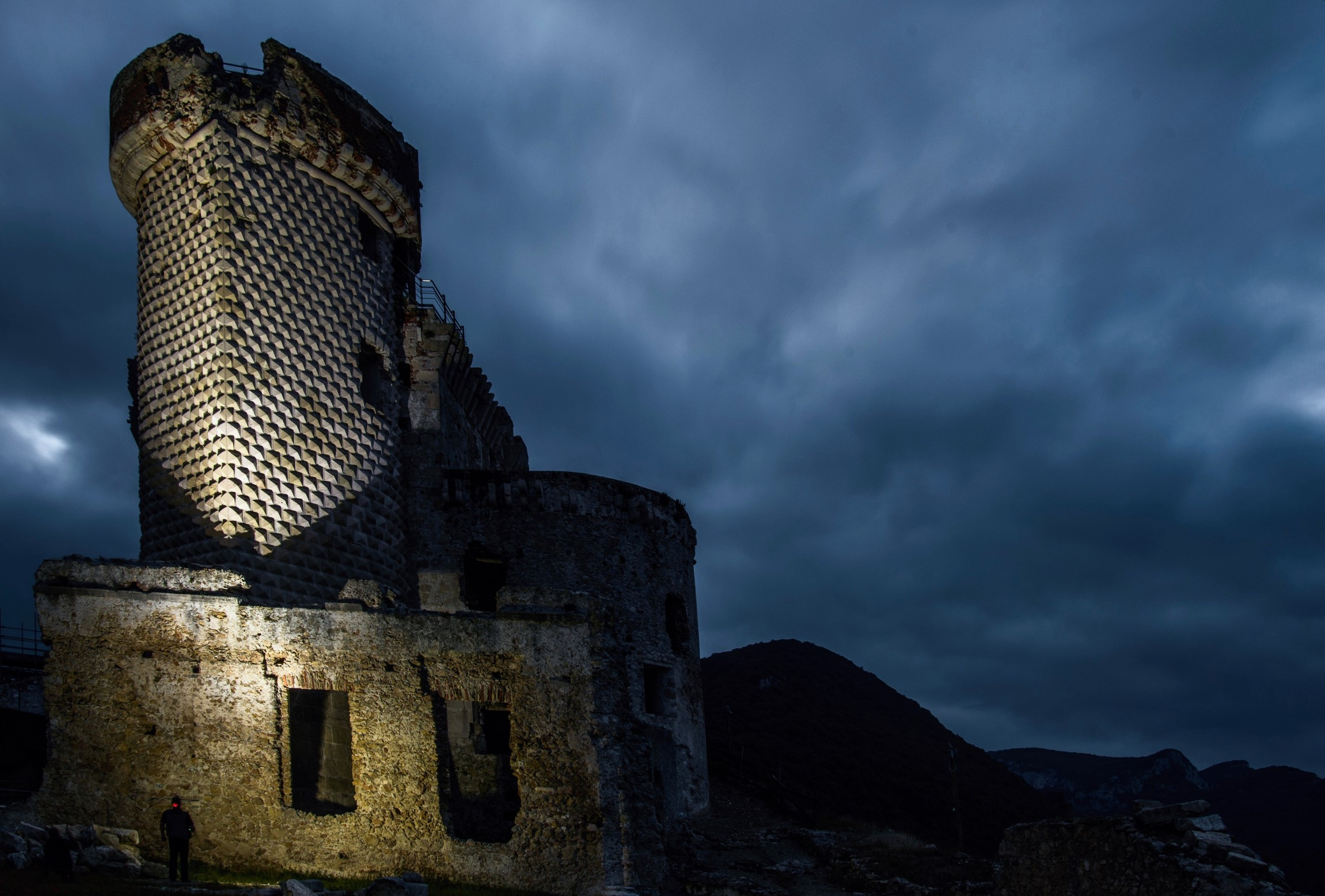 Castel Gavone This is a photo of a monument which is part of cultural heritage of Italy.